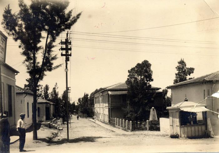 העיריה הישנה של פתח-תקוה (בית פקידות הברון)ברחוב מונטפיורי. בתמונה אנדרטה מצבה לחללי תרפ"א. בפינת הרחוב מבנה של קיוסק ועמוד חשמל.